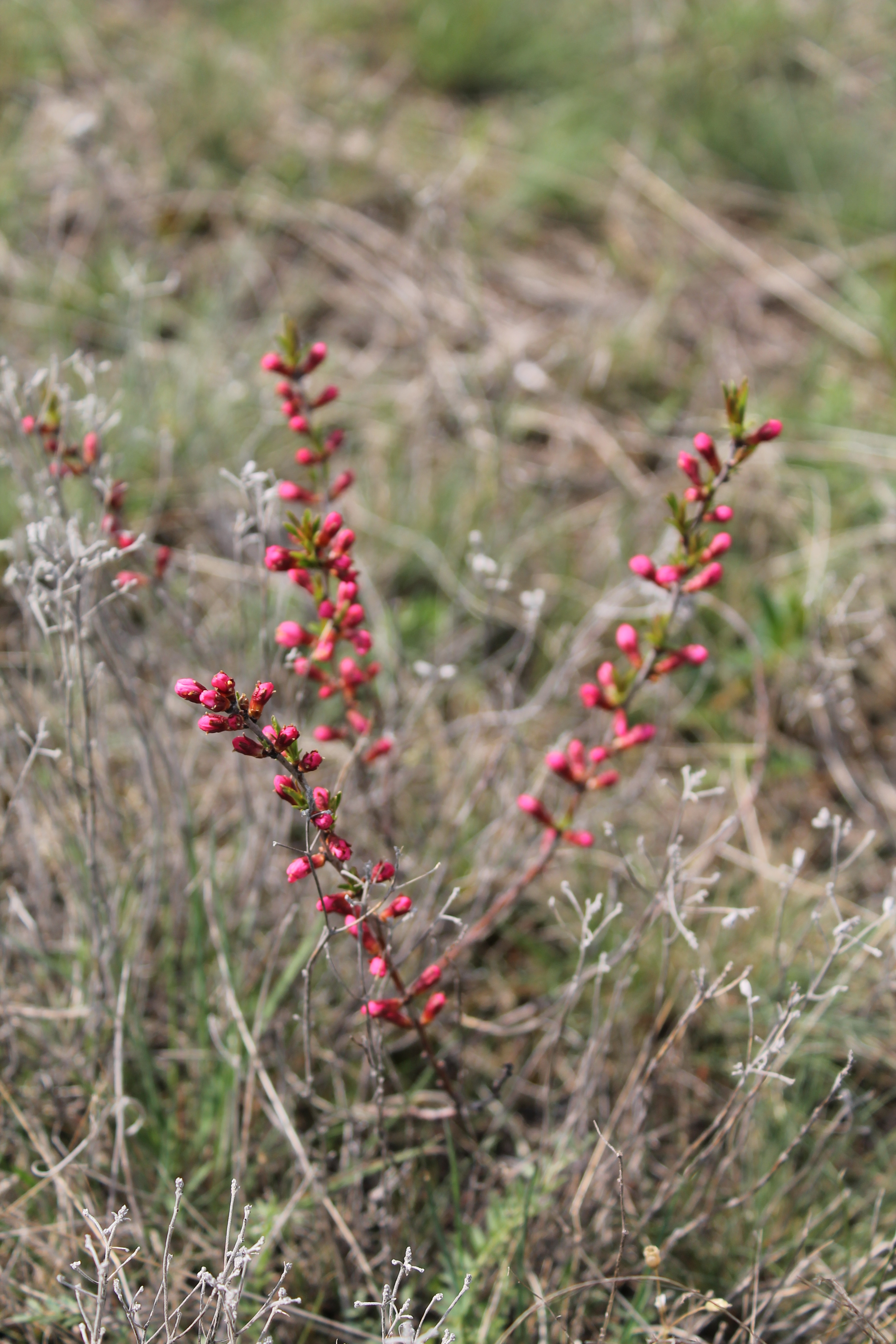 Мигдаль степовий. Розквітаюча рослина. Україна, Дніпропетровська область, Криворізький район.